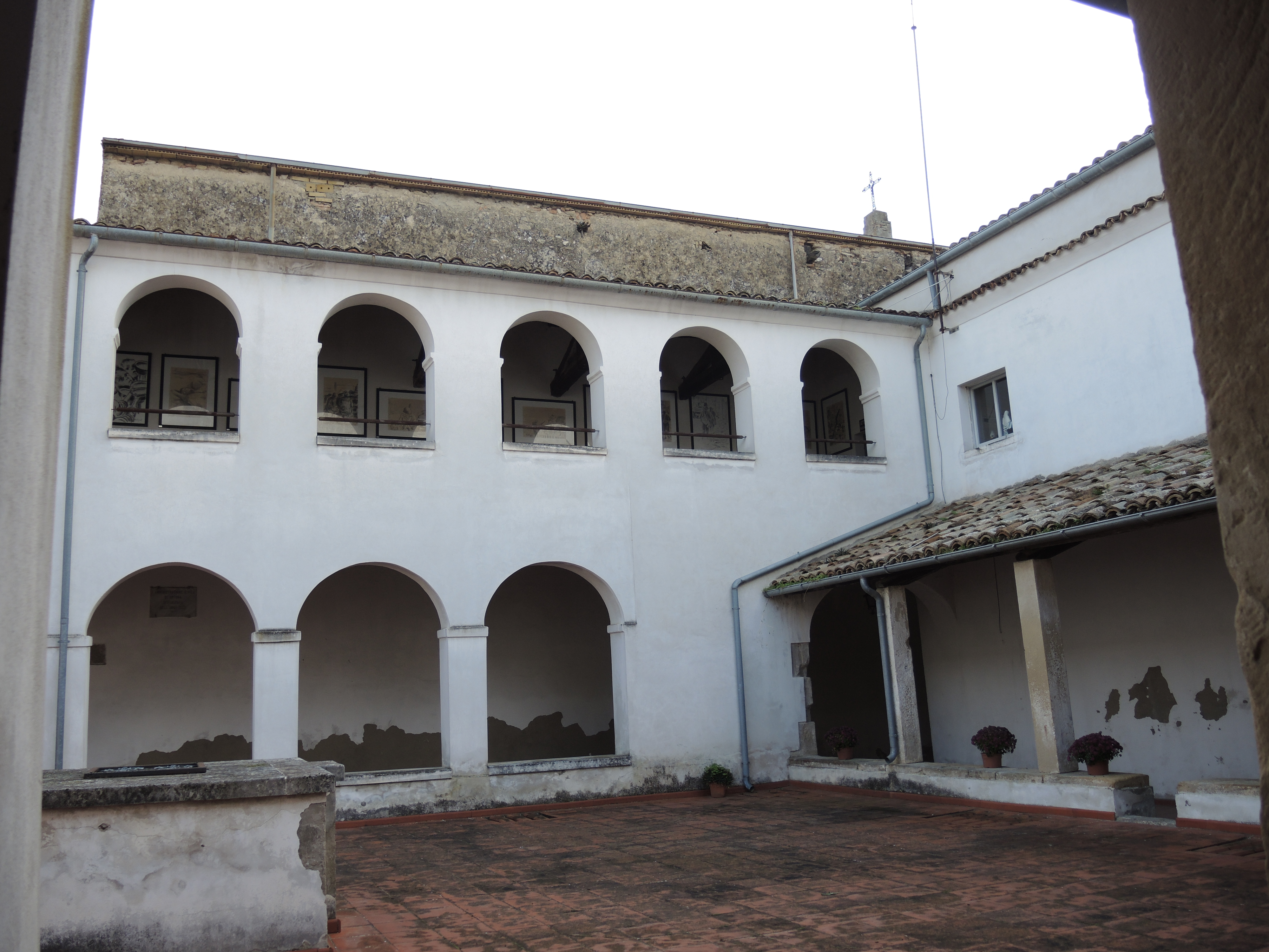 Ortona: Chiesa della Santissima Trinità